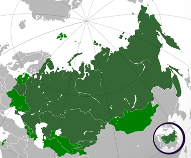 Extensión del ruso.